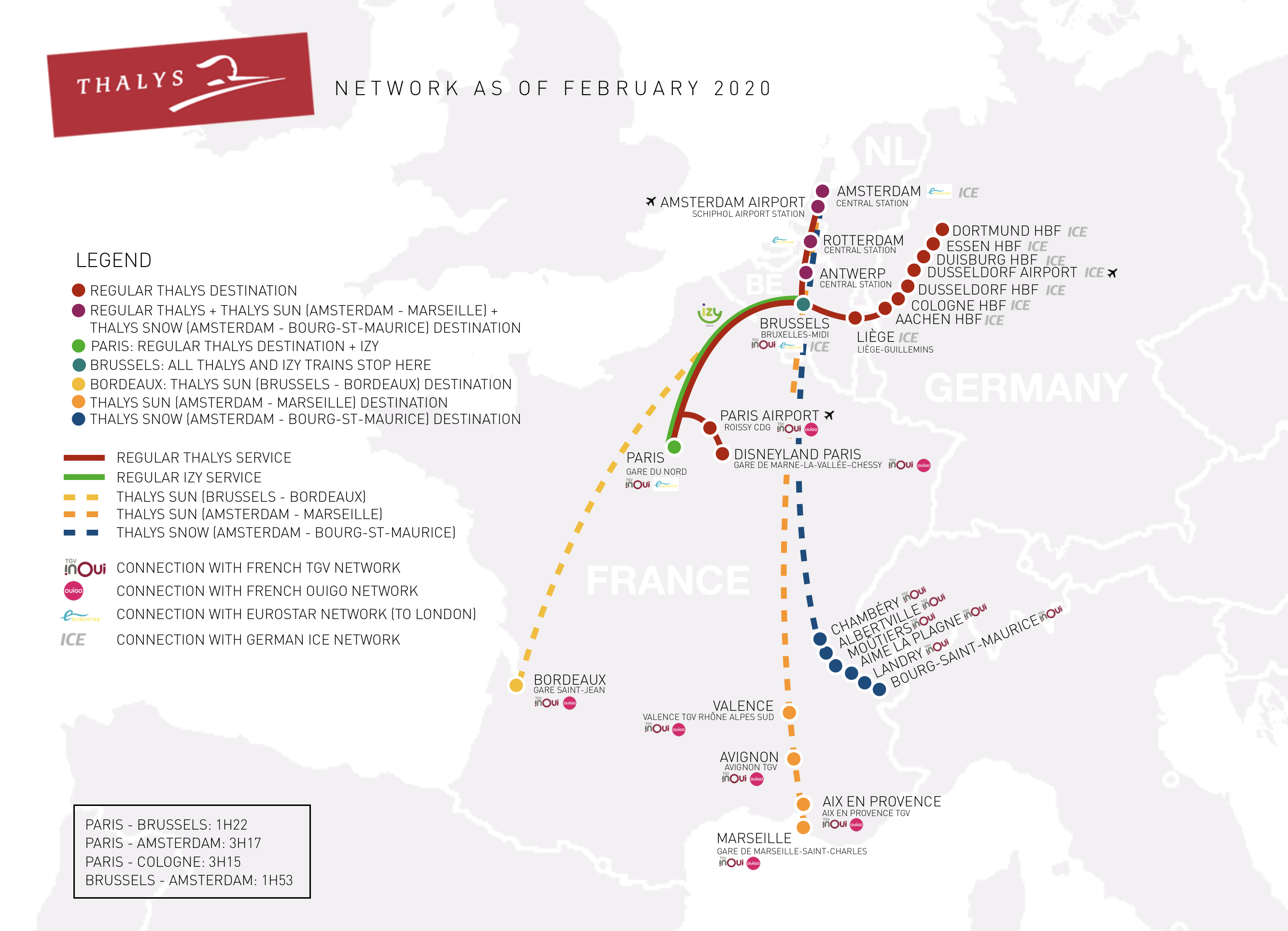 Carte du réseau Thalys en 2020